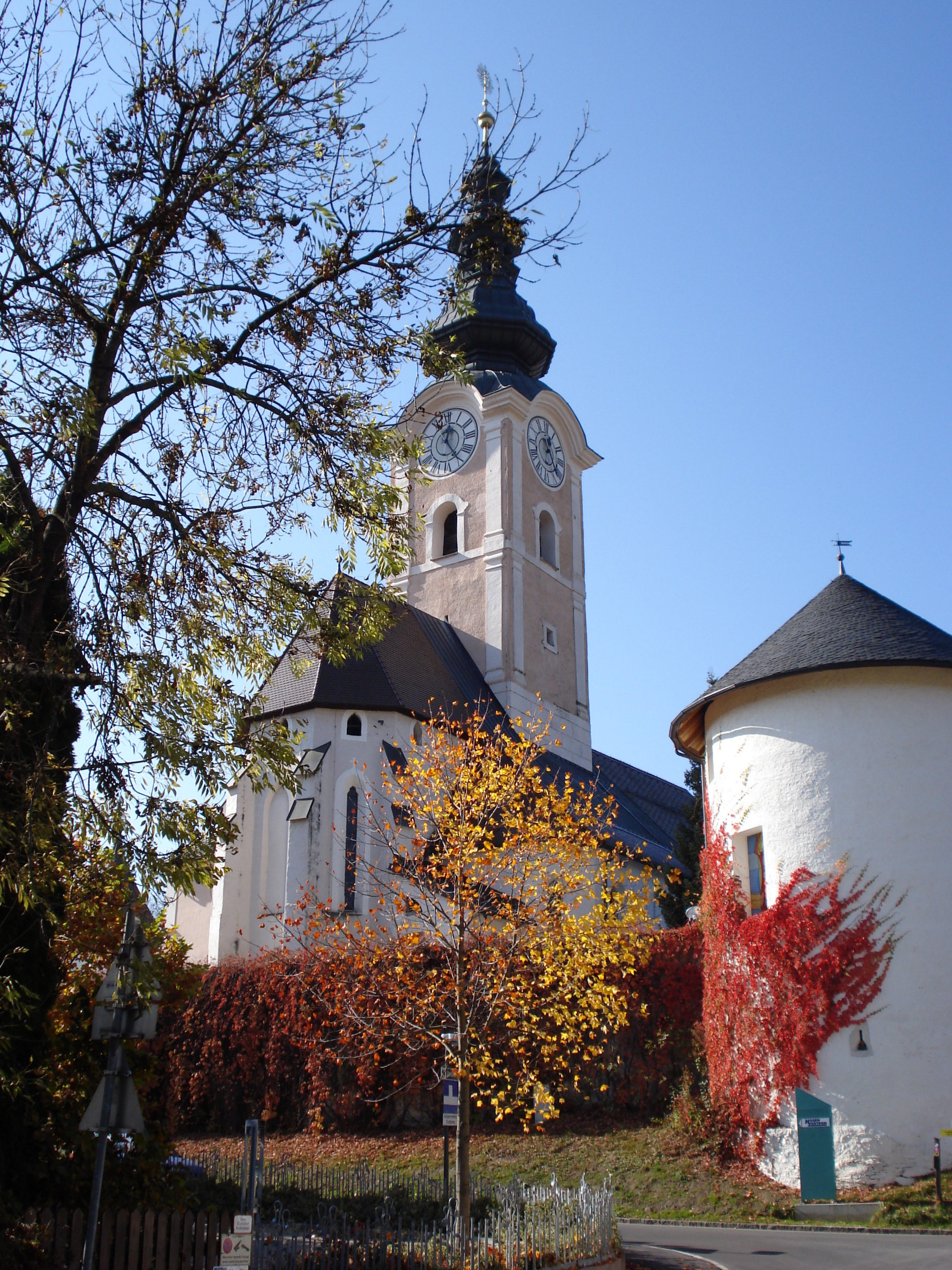 Kath. Stadtpfarrkirche Feldkirchen Mariae Himmelfahrt (Maria im Dorn)